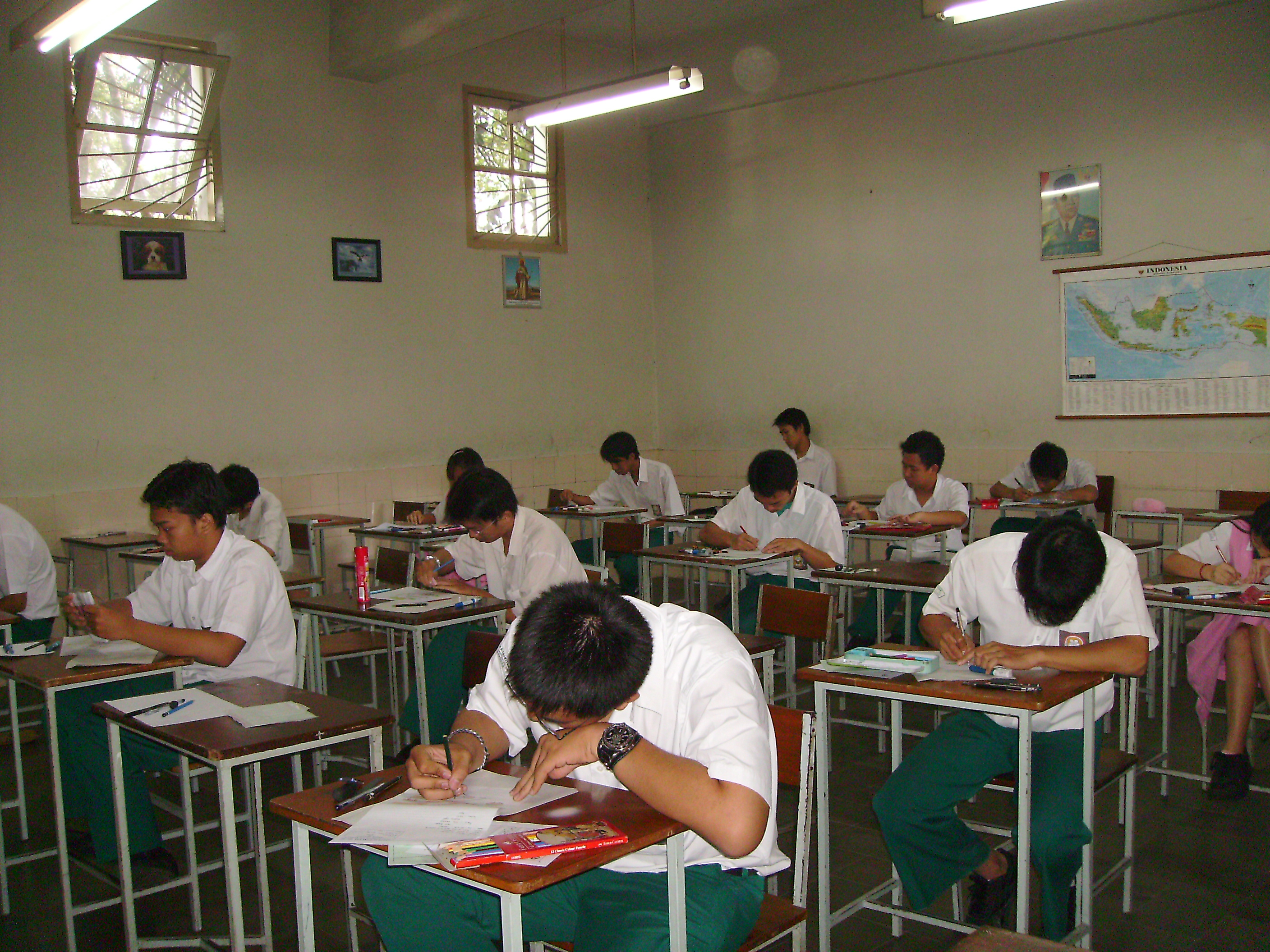 SMA Trinitas, Ulangan Umum